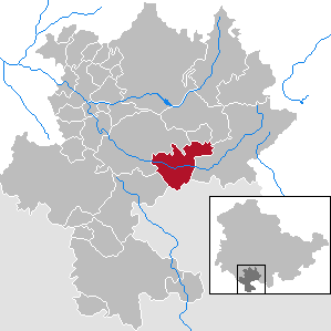 Veilsdorf in Thuringia - district Hildburghausen